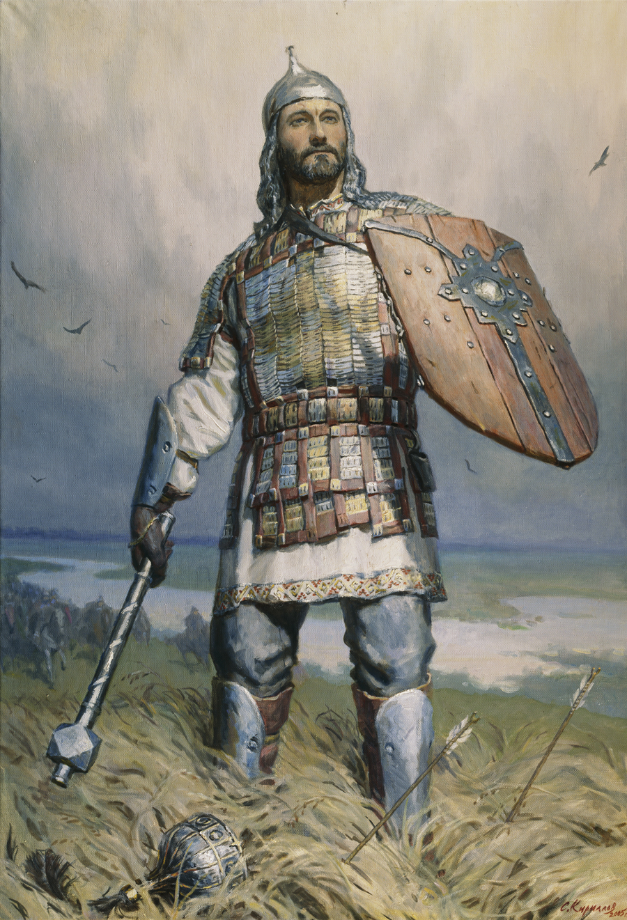 Сергей Кириллов. «Дмитрий Донской». 2005. Х.м. 160x110